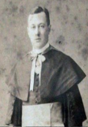 Vilmos Batthyány, 1870-1923, Weihbischof (1902-1905), Koadjutorbischof (1905-1911), Bischof von Nitra (1911-1920)